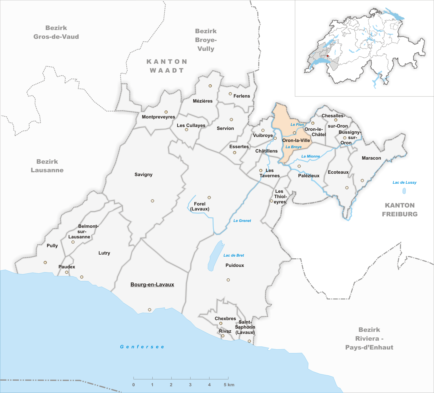 Municipality Oron-la-Ville